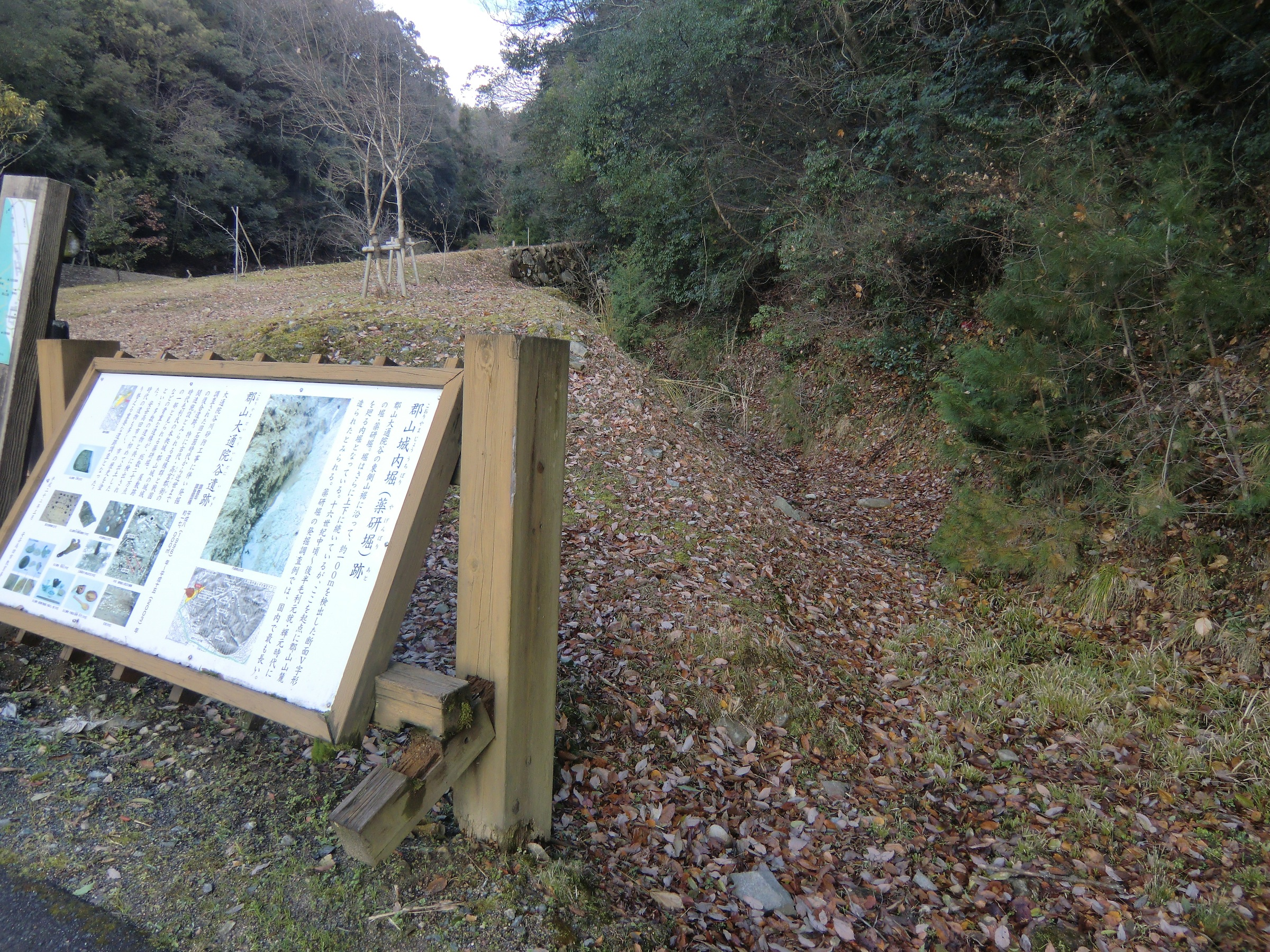 吉田郡山城跡の大通院谷にある内堀跡（安芸高田市）